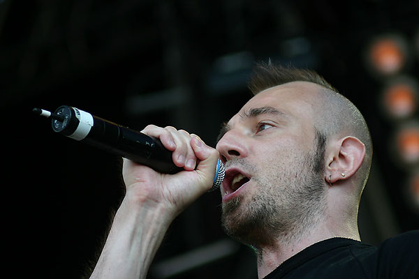 Steffen Keth, Sänger von De/Vision. Konzertfoto vom M'era Luna Festival 2004.